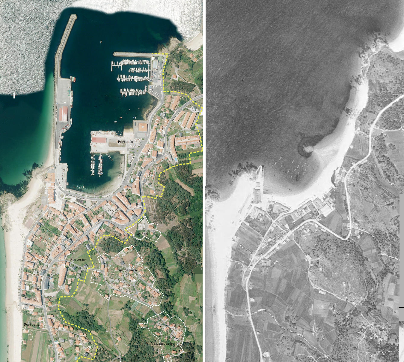 Comparación de una Ortofoto actual de Portosín (Porto do Son) y una foto aerea de 1955.